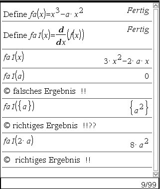 Hardcopy eines TI-nspire CAS